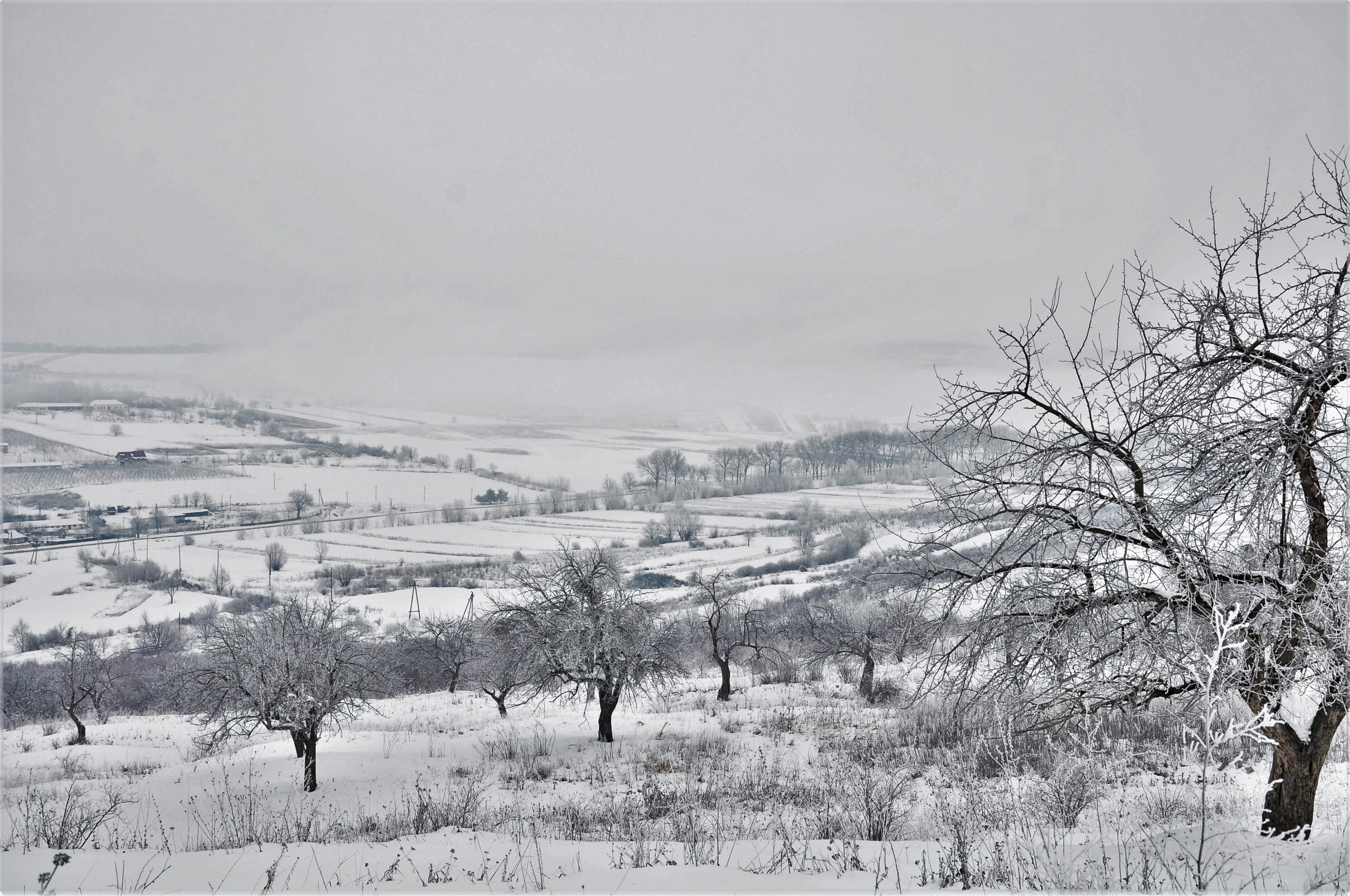 Codru, monument al naturii amplasat în raionul Strășeni, satul Lozova (cod MD-ST-rs-001)